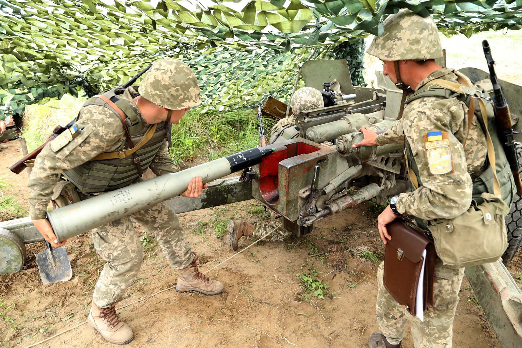 На полігоні Міжнародного центру миротворчості та безпеки відбулася посвята курсантів І курсу Національної академії сухопутних військ імені гетьмана Петра Сагайдачного в артилеристи. Упродовж навчального року курсанти вивчали гармату МТ-12 “Рапіра»”, теорію та методику проведення стрільб, щоби здійснити свій перший постріл самостійно.